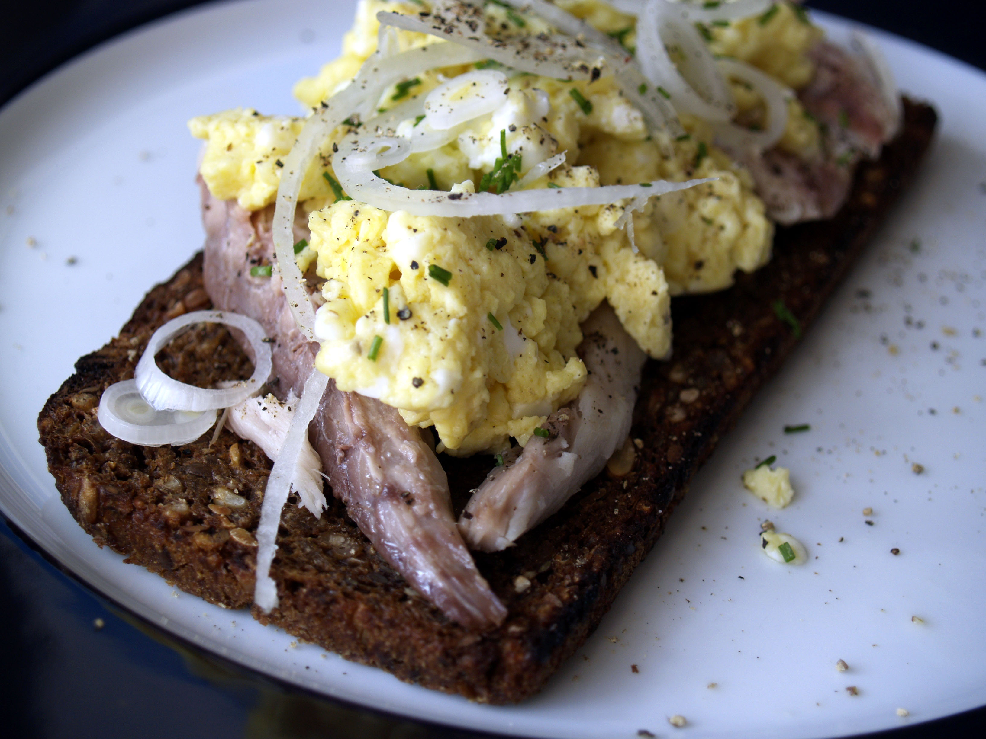 Ristet rugbrød med røget makrel og røræg